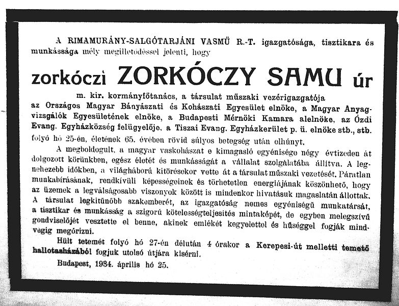 zorkóczi Zorkóczy Samu gyászjelentése.